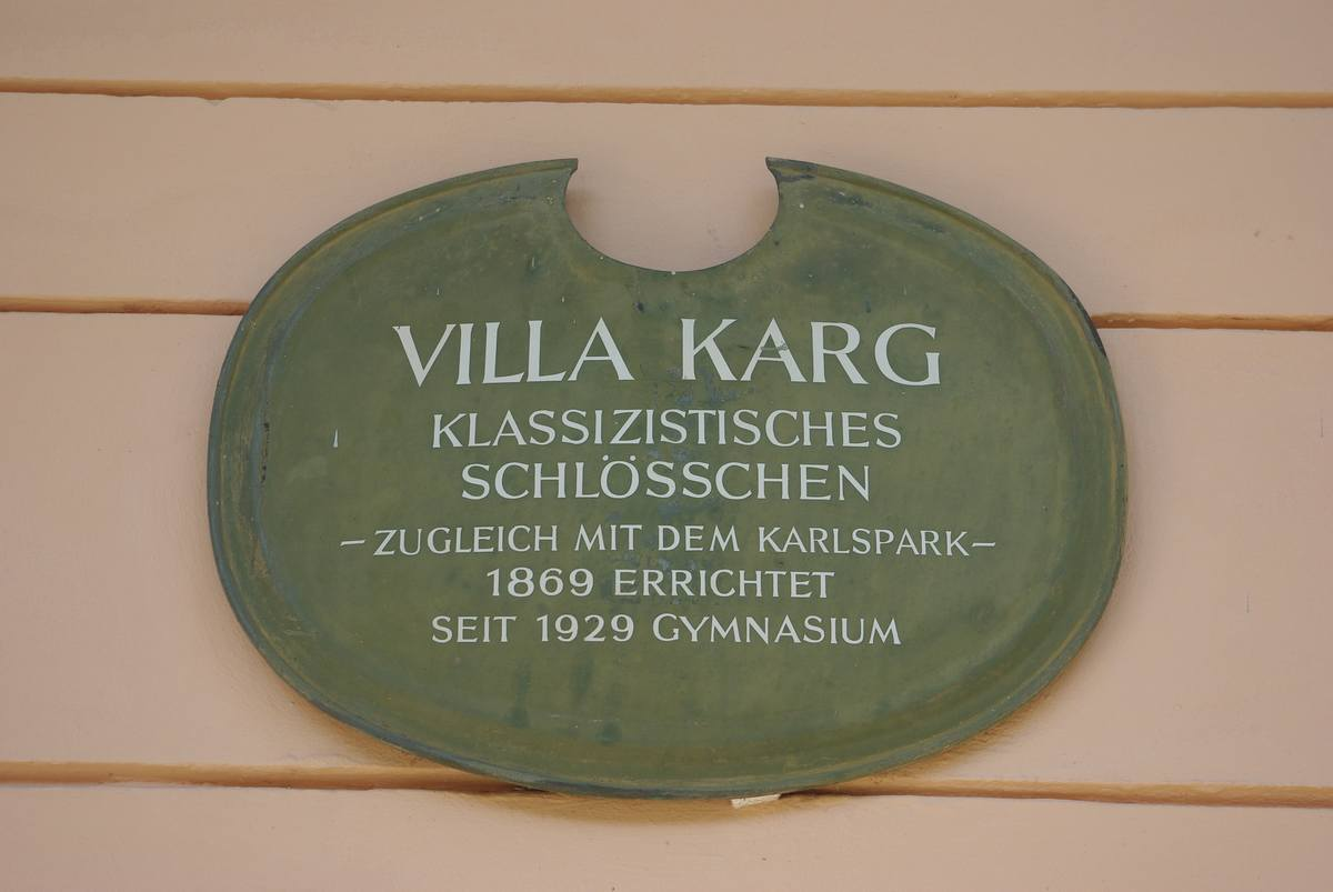 Villa Karg in 83435 Bad Reichenhall, Hinweisschild auf ein Baudenkmal bzw. ein wichtiges Gebäude